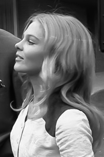 Bundeskanzler Willy Brandt empfÃ¤ngt Filmschauspieler: Heidi Hansen